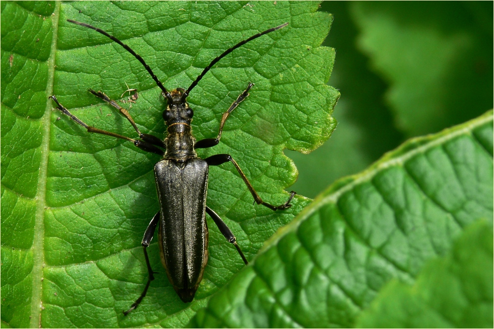 Variabler Stubbenbock (Stenocorus meridianus)